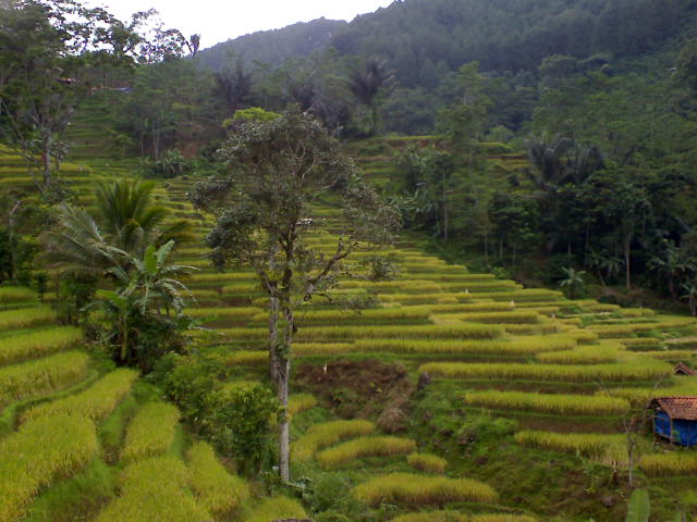 Sawah Kopo Sumpinghayu